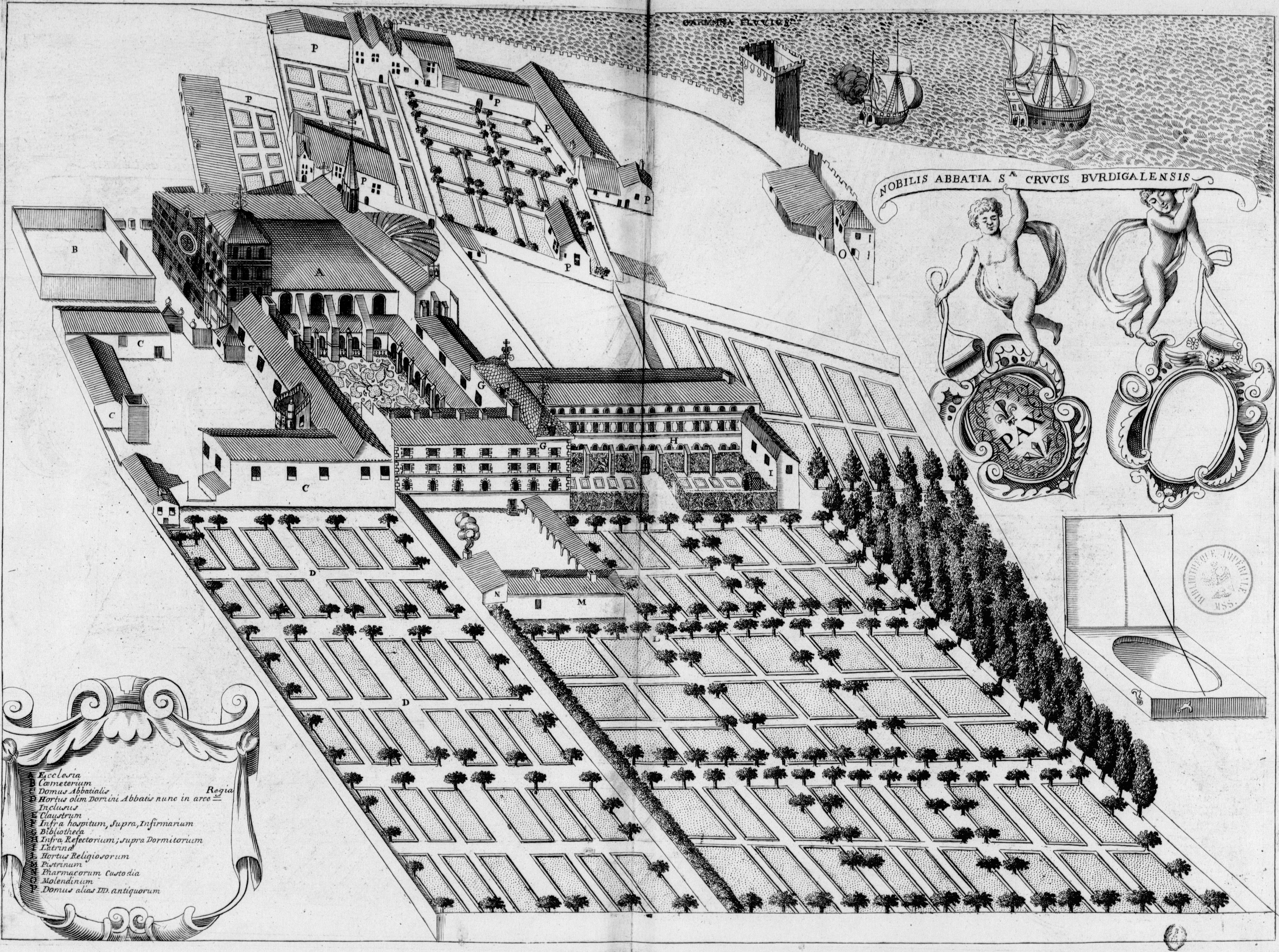 Planche gravée du 17ème siècle représentant l'abbaye Sainte-Croix de Bordeaux, en France, dans le livre Monasticon Gallicanum.